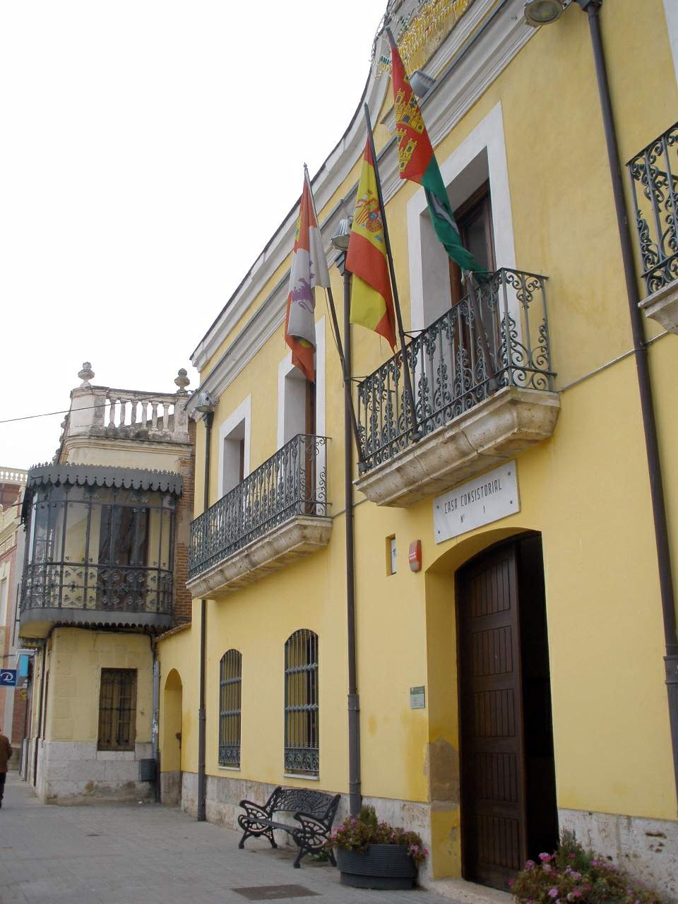 Ayuntamiento de Rueda (Valladolid)